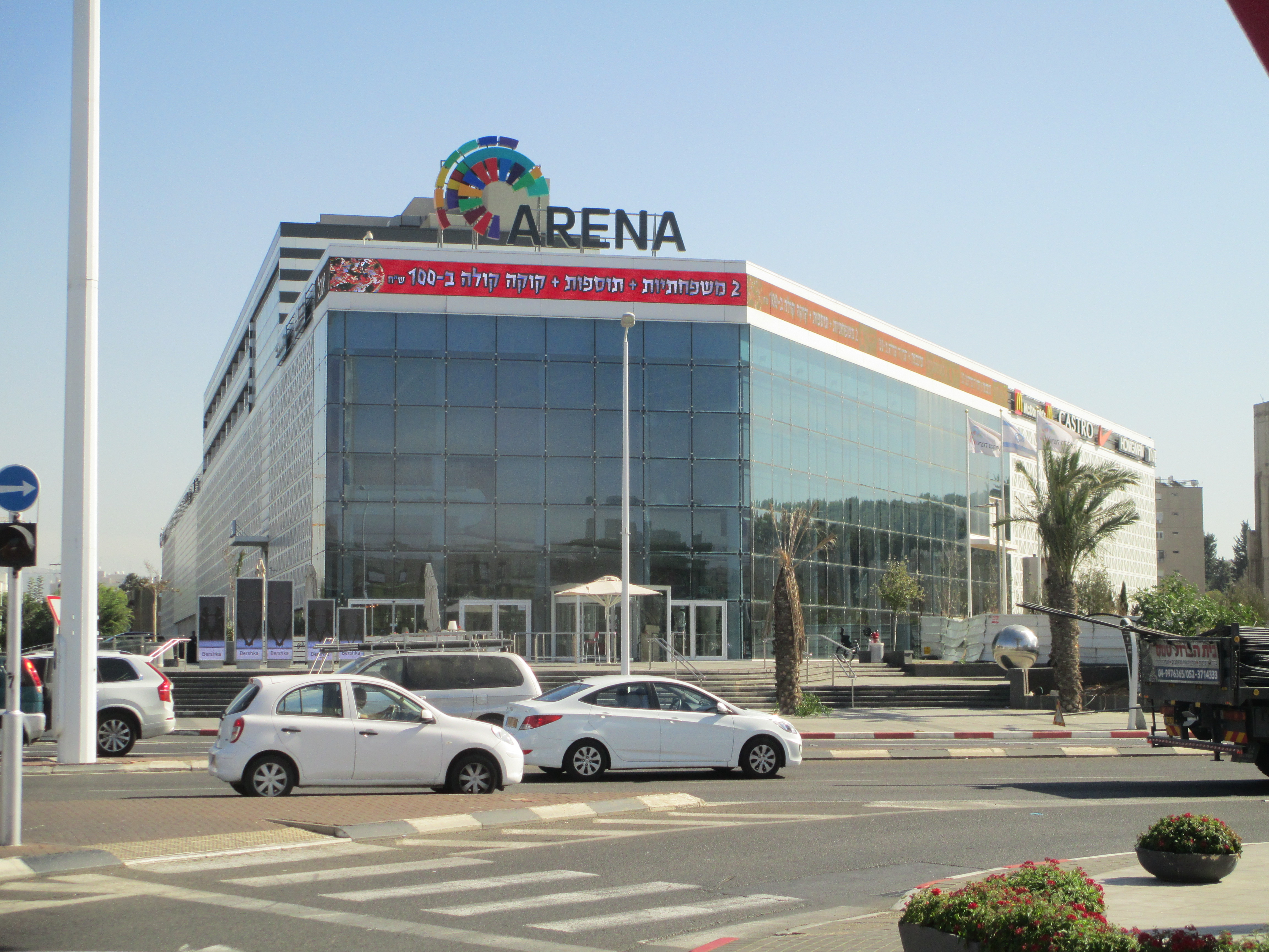 קניון ארנה בנהריה